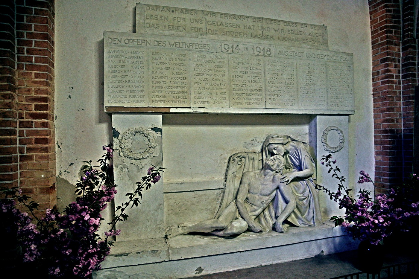 Denkmal für die Plauer Gefallenen des Ersten Weltkriegs in der Plauer Marienkirche